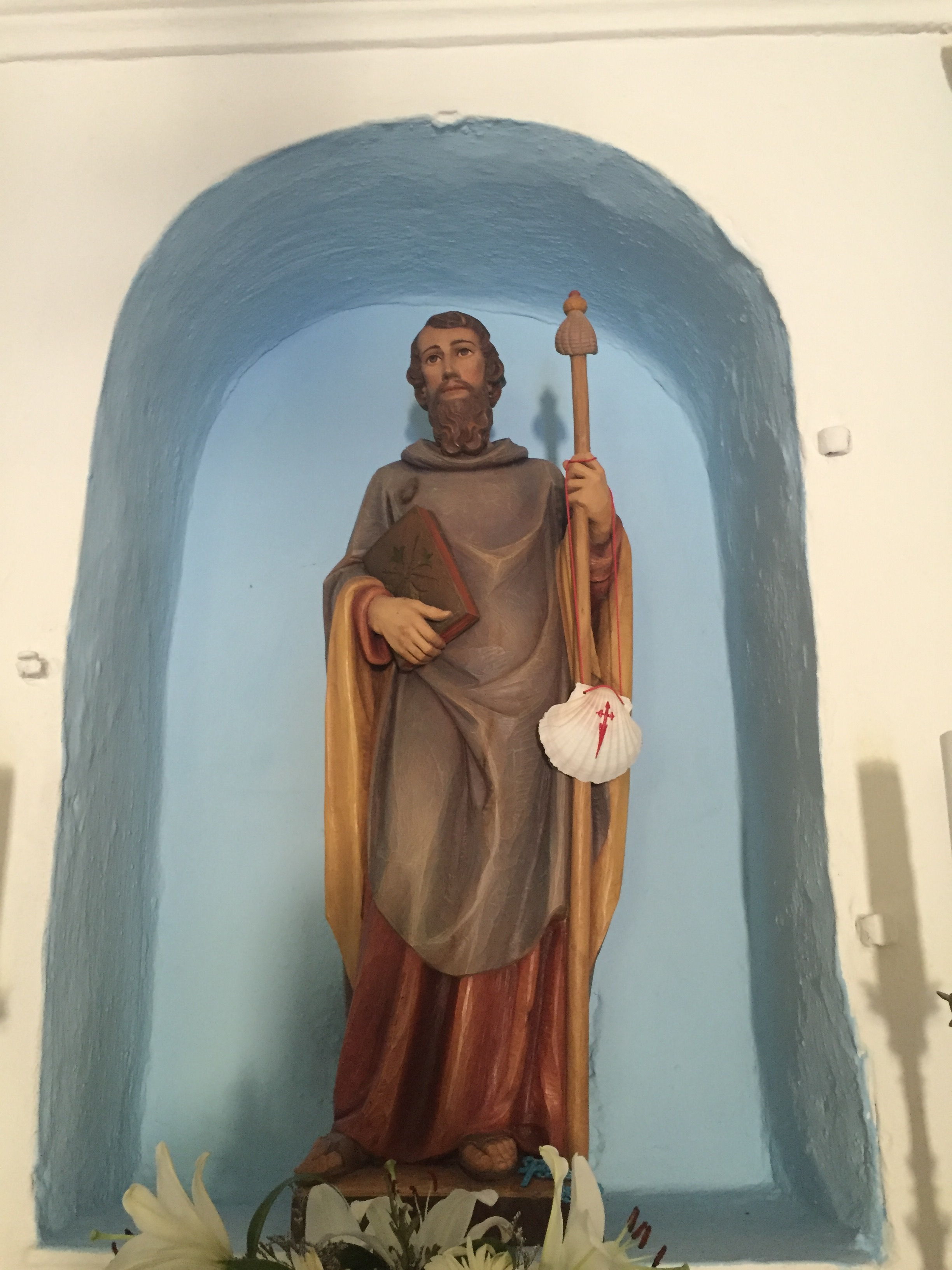 Chiesa di San Giacomo (Aggius), 2016